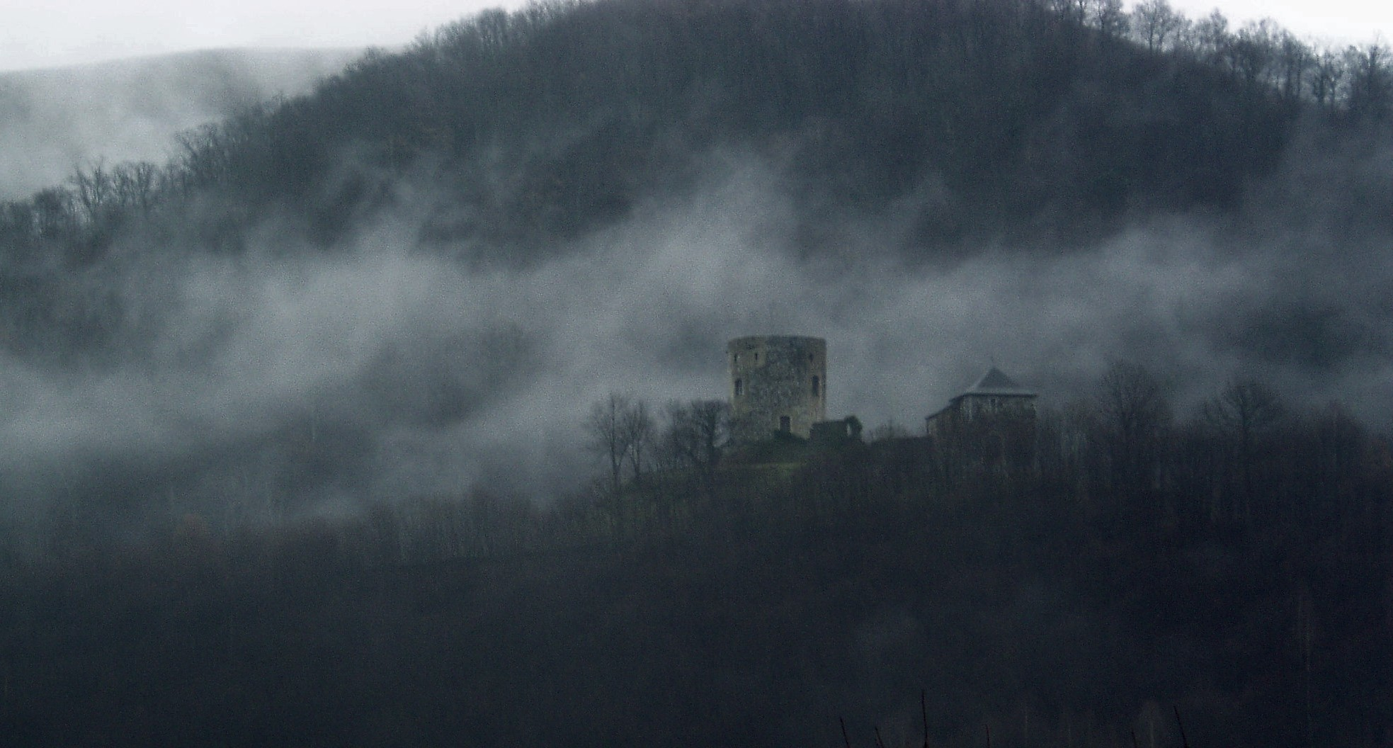 Chateau des Angles (65 Hautes-Pyrénées). Auteur de la photographie.